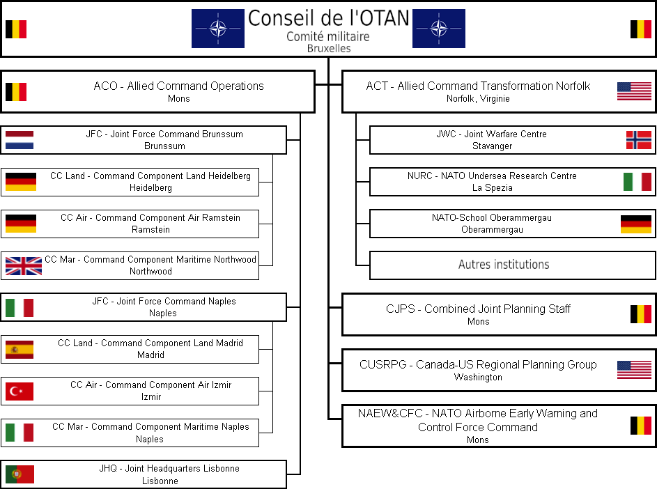 NATO-Kommandostruktur in 2006